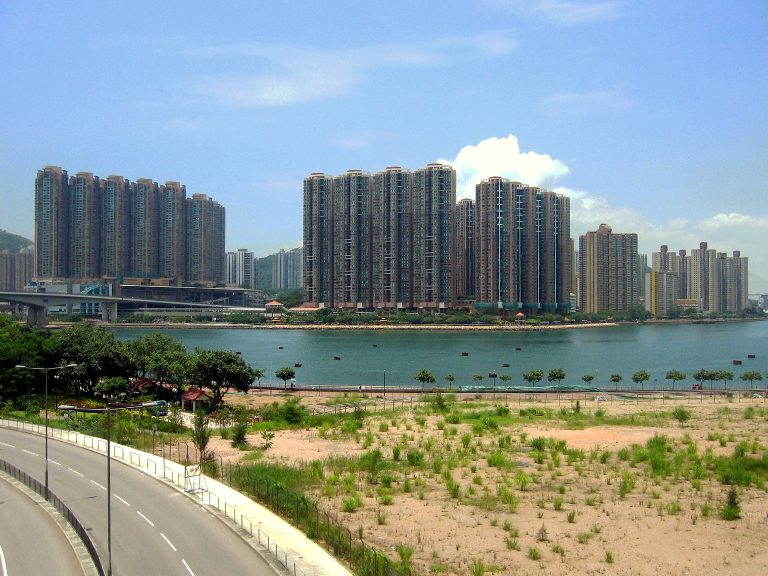 Tsing Yi Island 青衣島